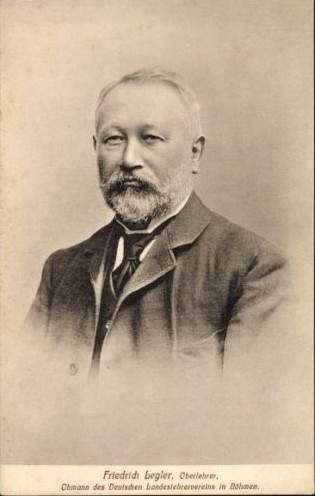 Friedrich Legler (1852 - 1919), Rakouský a český pedagog, odborný novinář a politik.